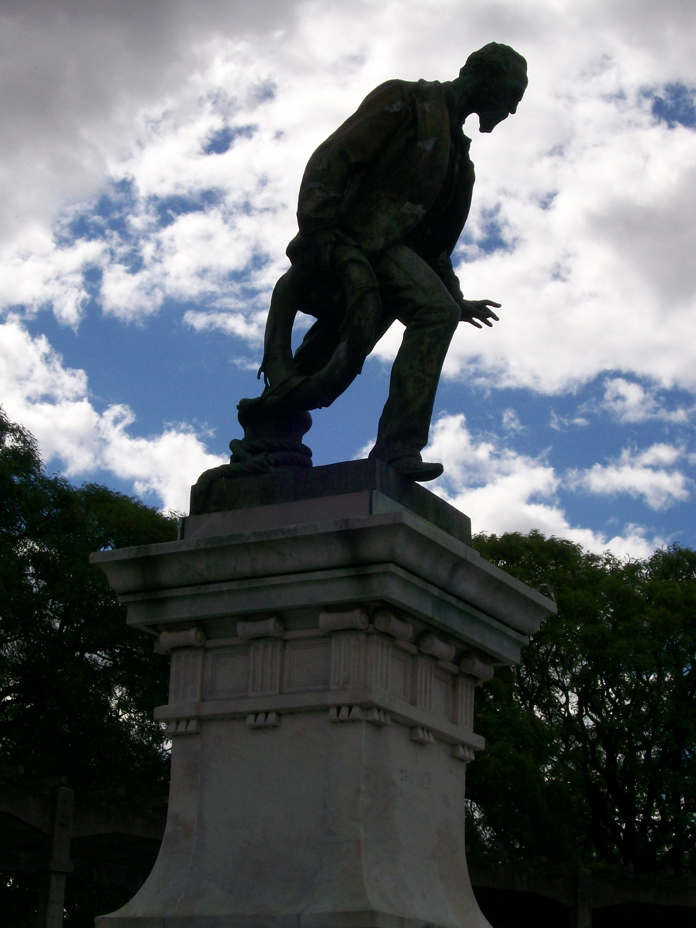 Monumento a Luis Viale.